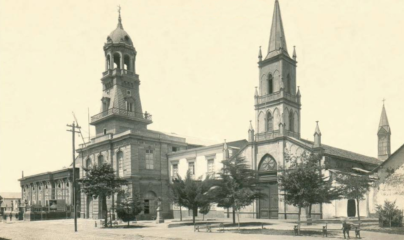 La Serena. Teatro nacional, Torre de bomberos e Iglesia la merced. Inicios del siglo XX